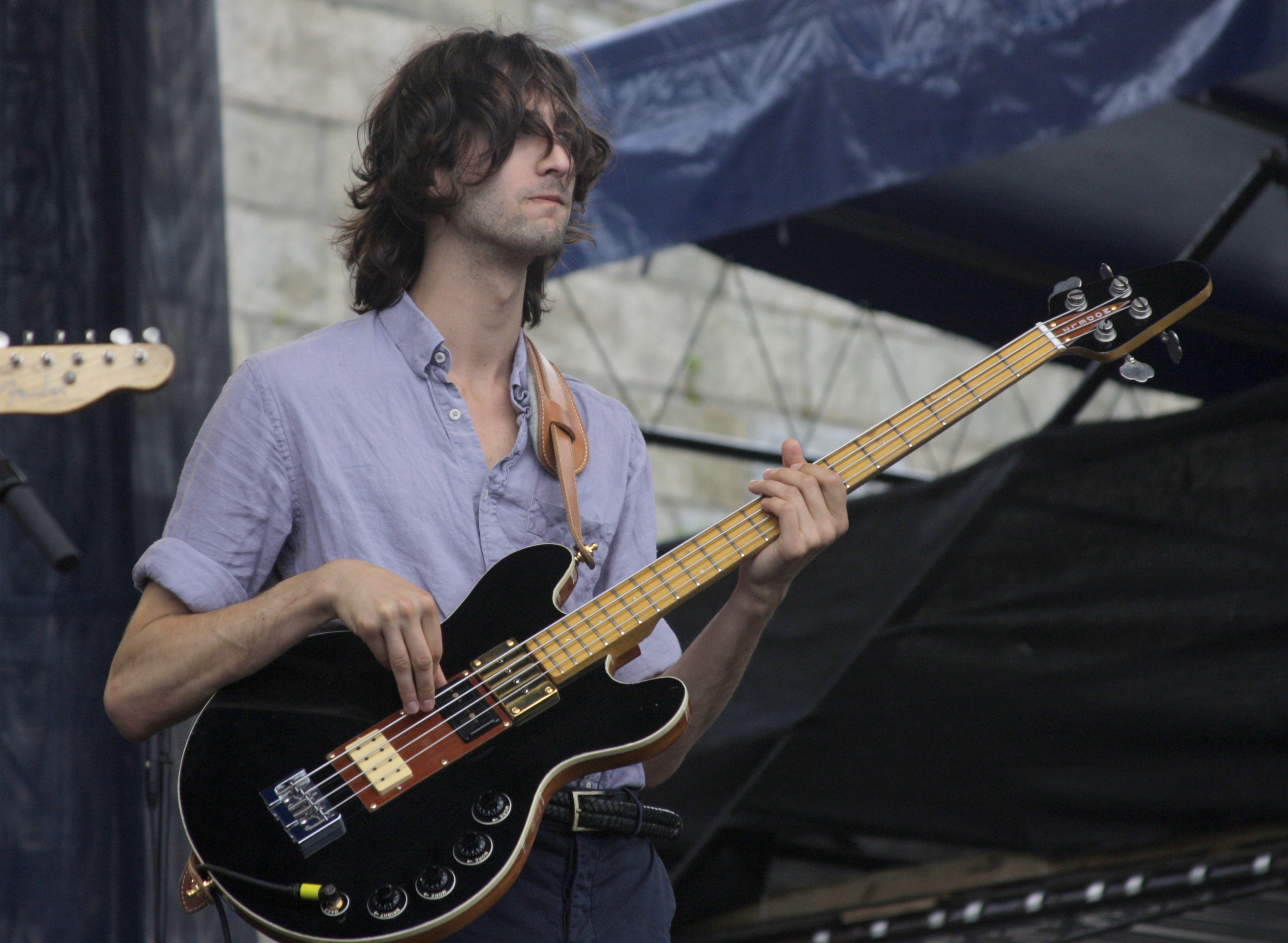 Dawes